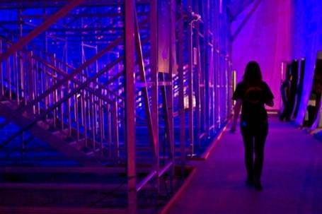 Visit our website